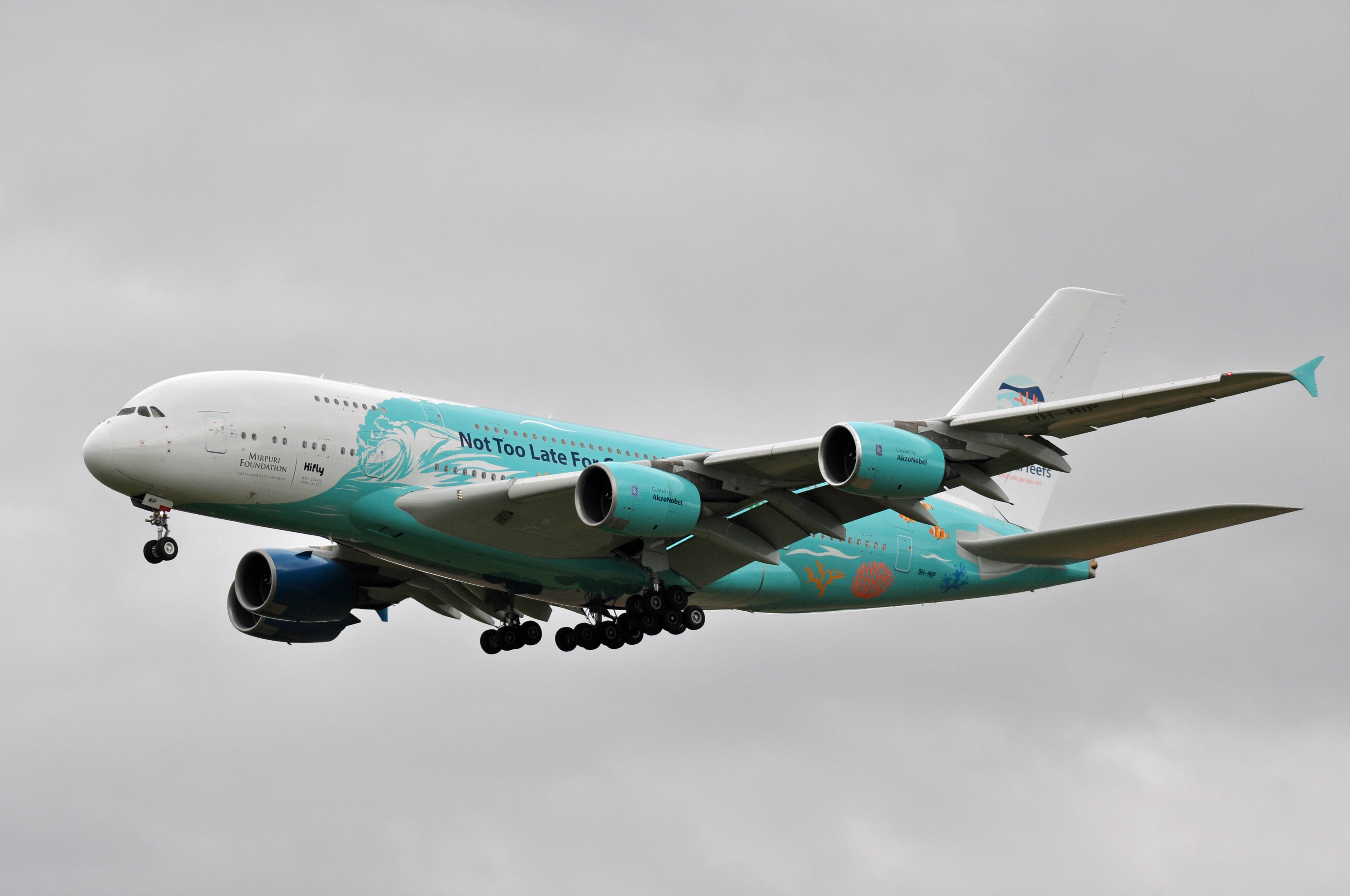 MSN 6 A380-841 / A380 / A380-800 HIFLY MALTA CDG AIRPORT EX SINGAPORE AIRLINES AS 9V-SKC